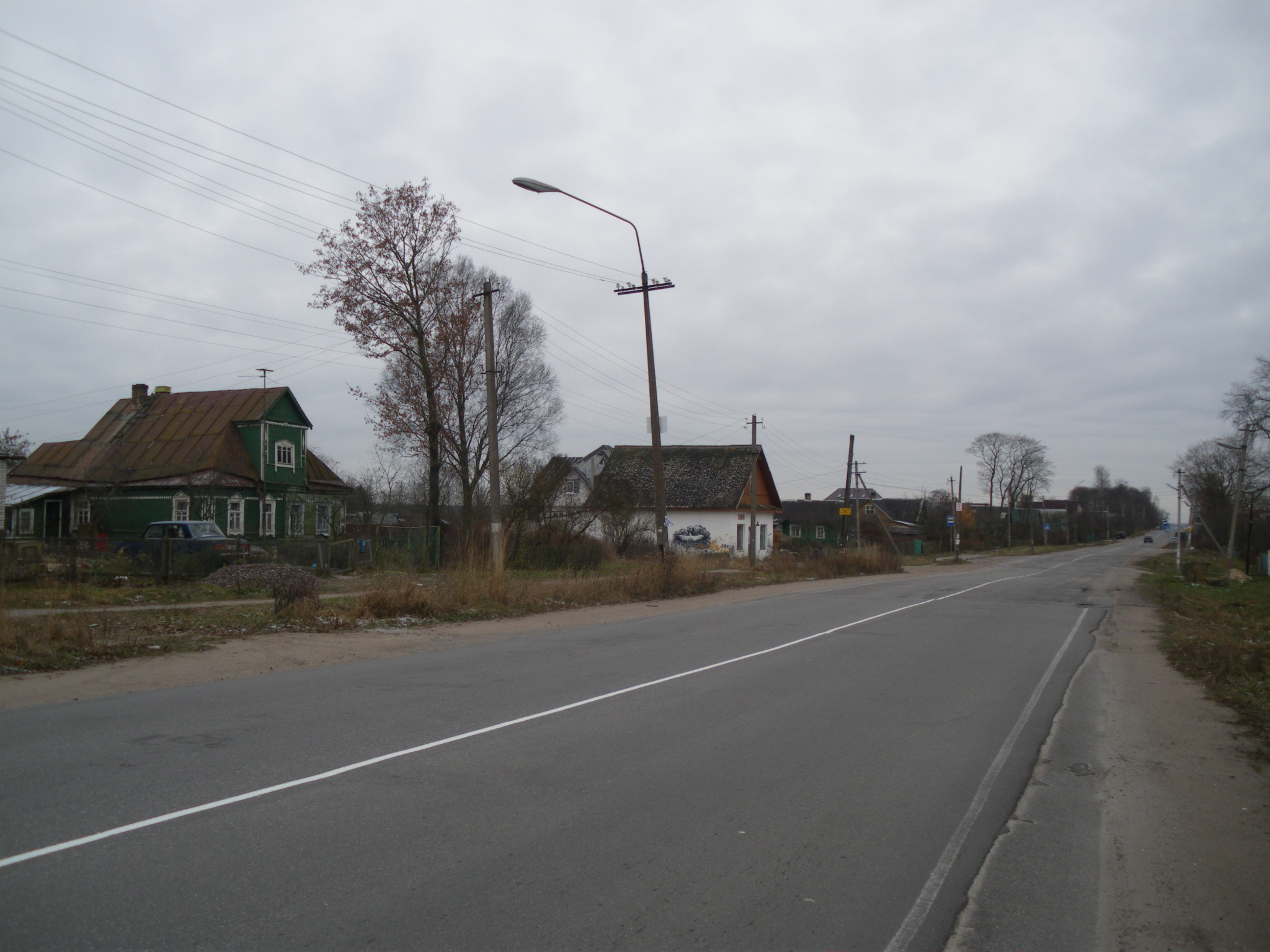 Россия, Ленинградская область, Ломоносовский район, село Русско-Высоцкое. Дата съёмки - 4 ноября 2009 г. Автор - Роговиков Николай.